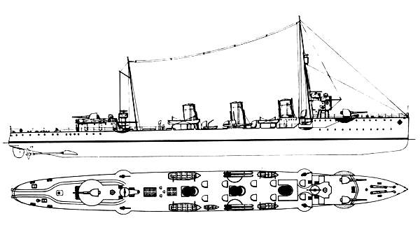 Riss und Decksplan der Spähkreuzer der Aquila-Klasse